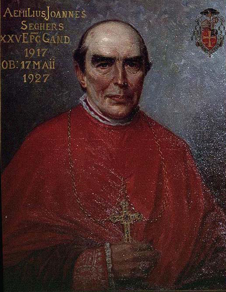 Sint-Baafskathedraal, Gent Portret van Mgr.J. Seghers; inv nr: 499